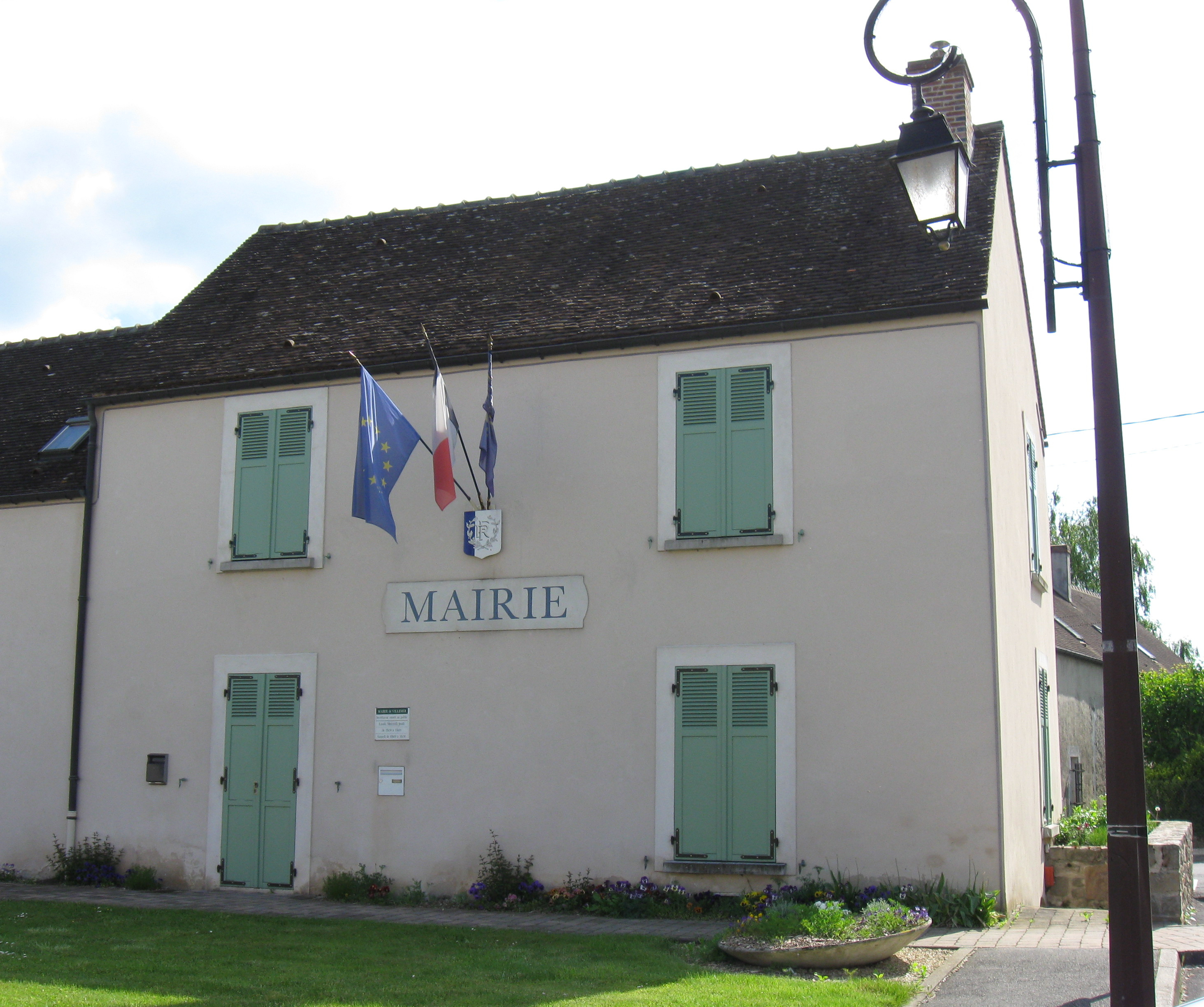 Mairie de Villemer. (département de la Seine-et-Marne, région Île-de-France).